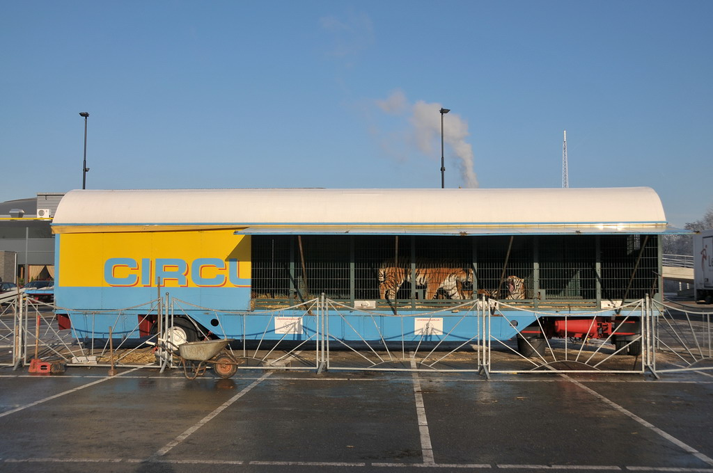 Siberische tijgers klaar voor vertrek. Het Oostenrijkse Belly Wien circus is niet onomstreden. Maar dat geldt in meer en mindere mate voor alle circussen met (wilde) dieren. Op het Internet wemelt het van de voor- en tegenstanders. Iedereen heeft er een mening over. Niet alleen de Partij voor de Dieren en ‘legale’ en ‘illegale’ actiegroepen maar zeker ook de gemeentes waar de tenten worden opgeslagen.